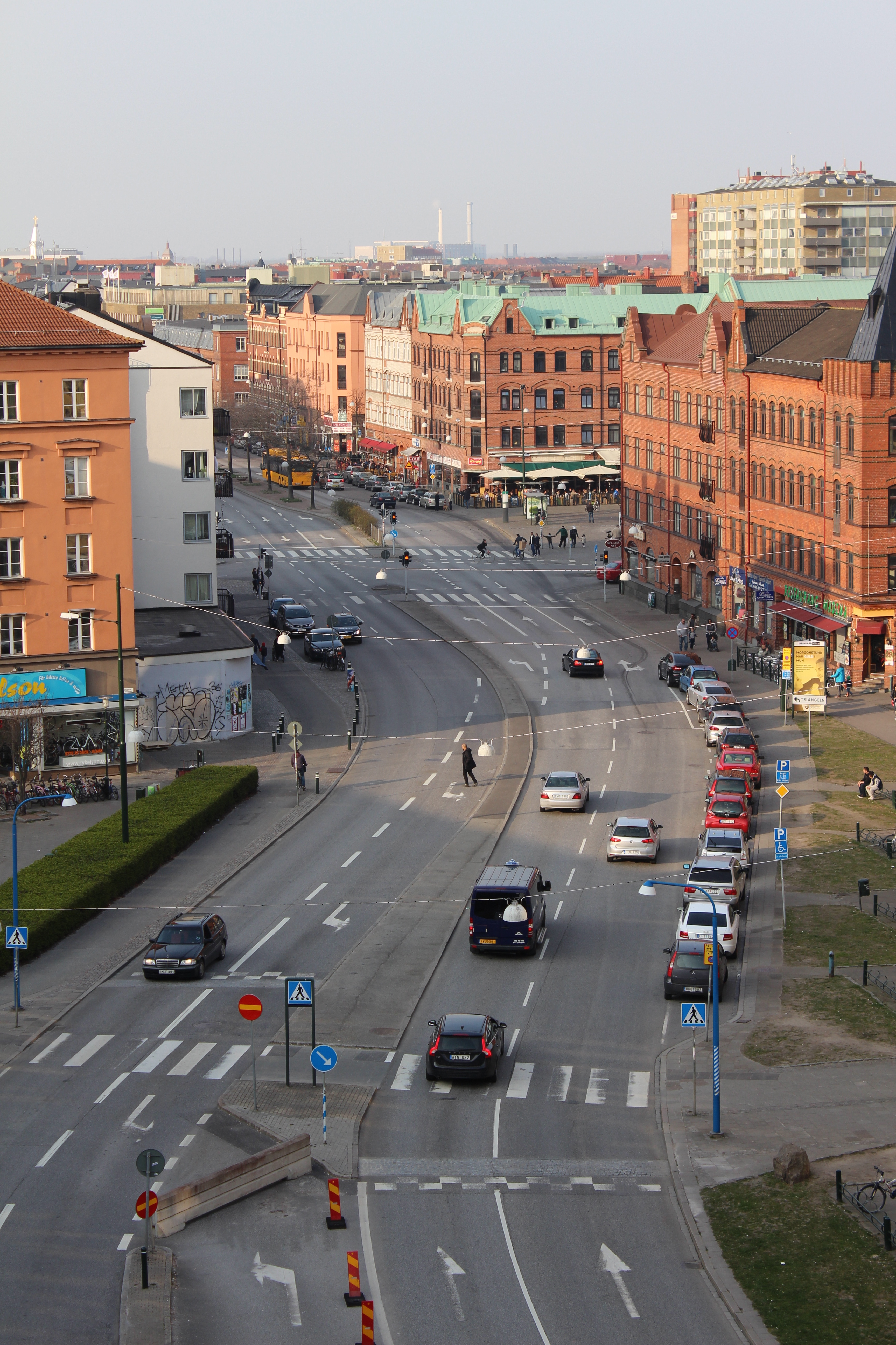 Bergsgatan och västra Möllevången med Möllevångstorget.